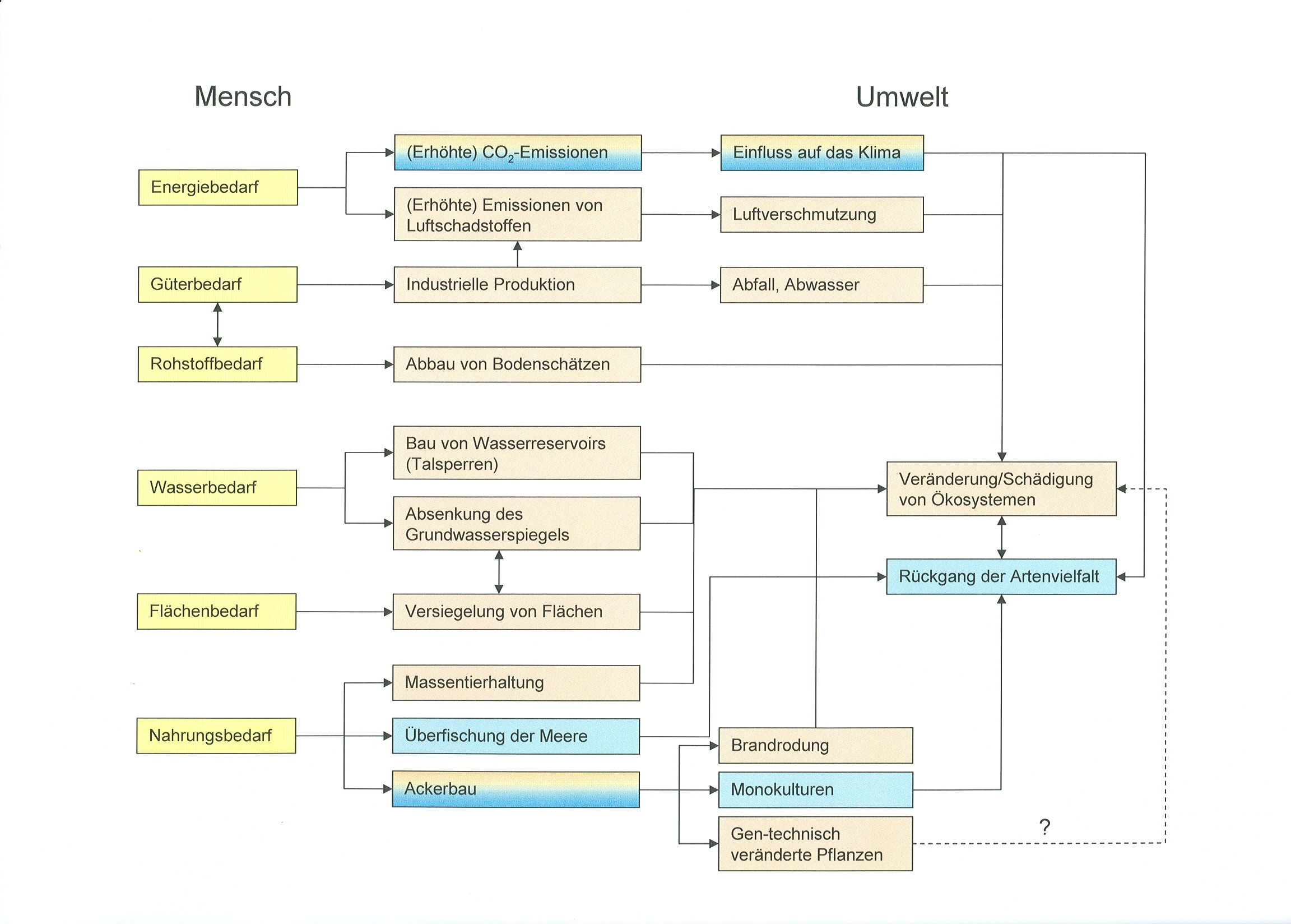 Einfluss des Menschen auf die Umwelt